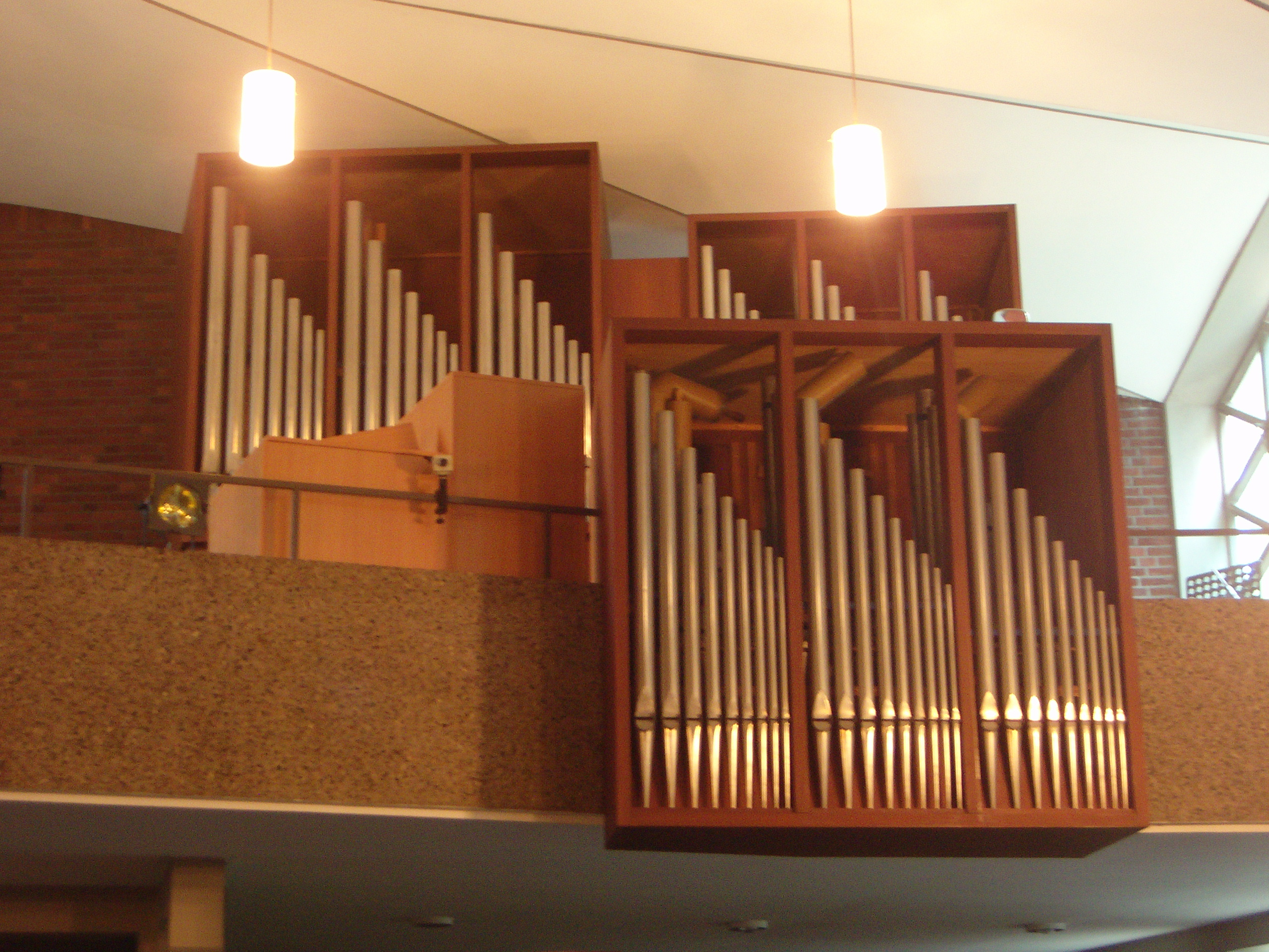 Die Walcker-Orgel von 1963